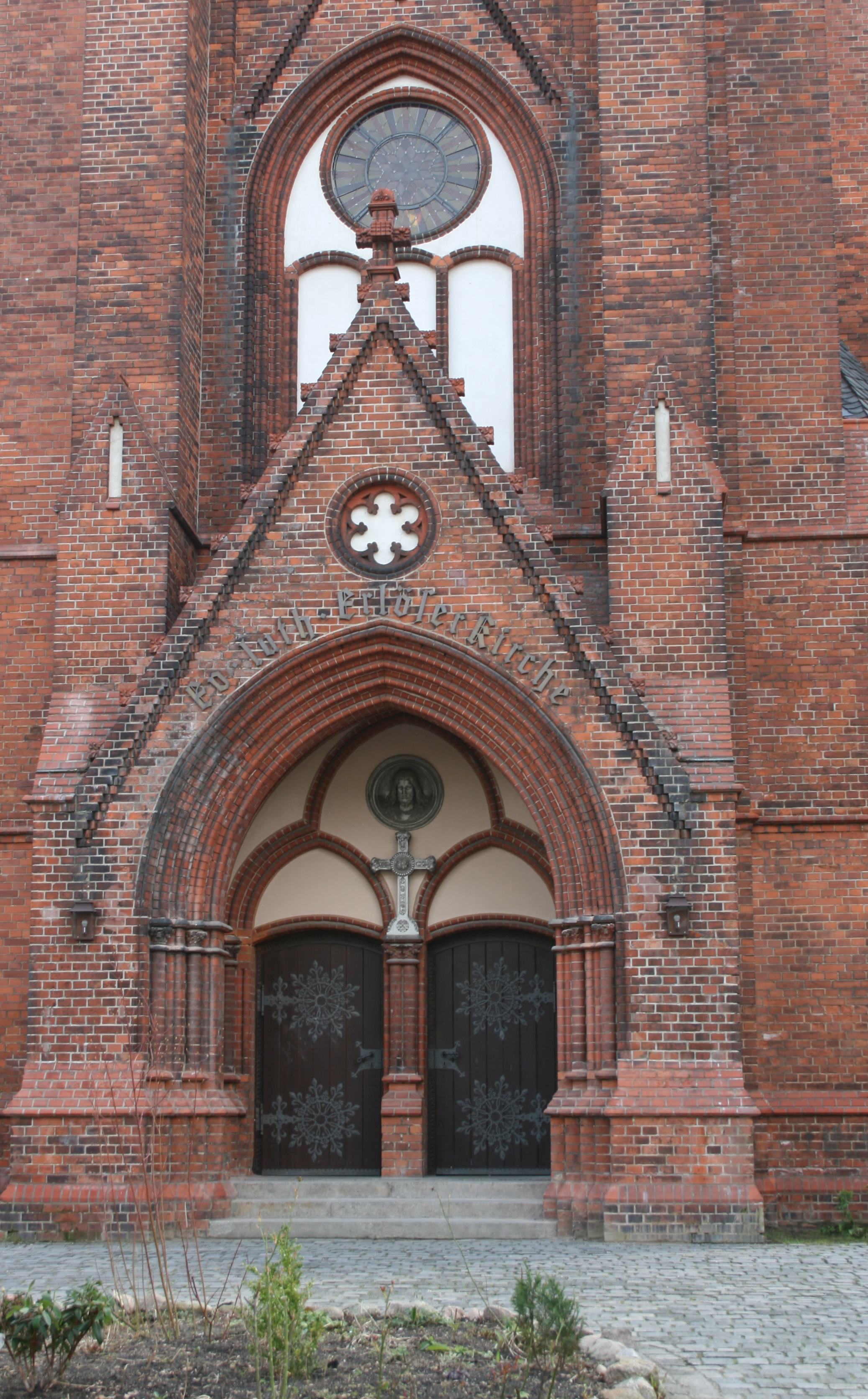 Portal der Erlöserkirche, Berlin